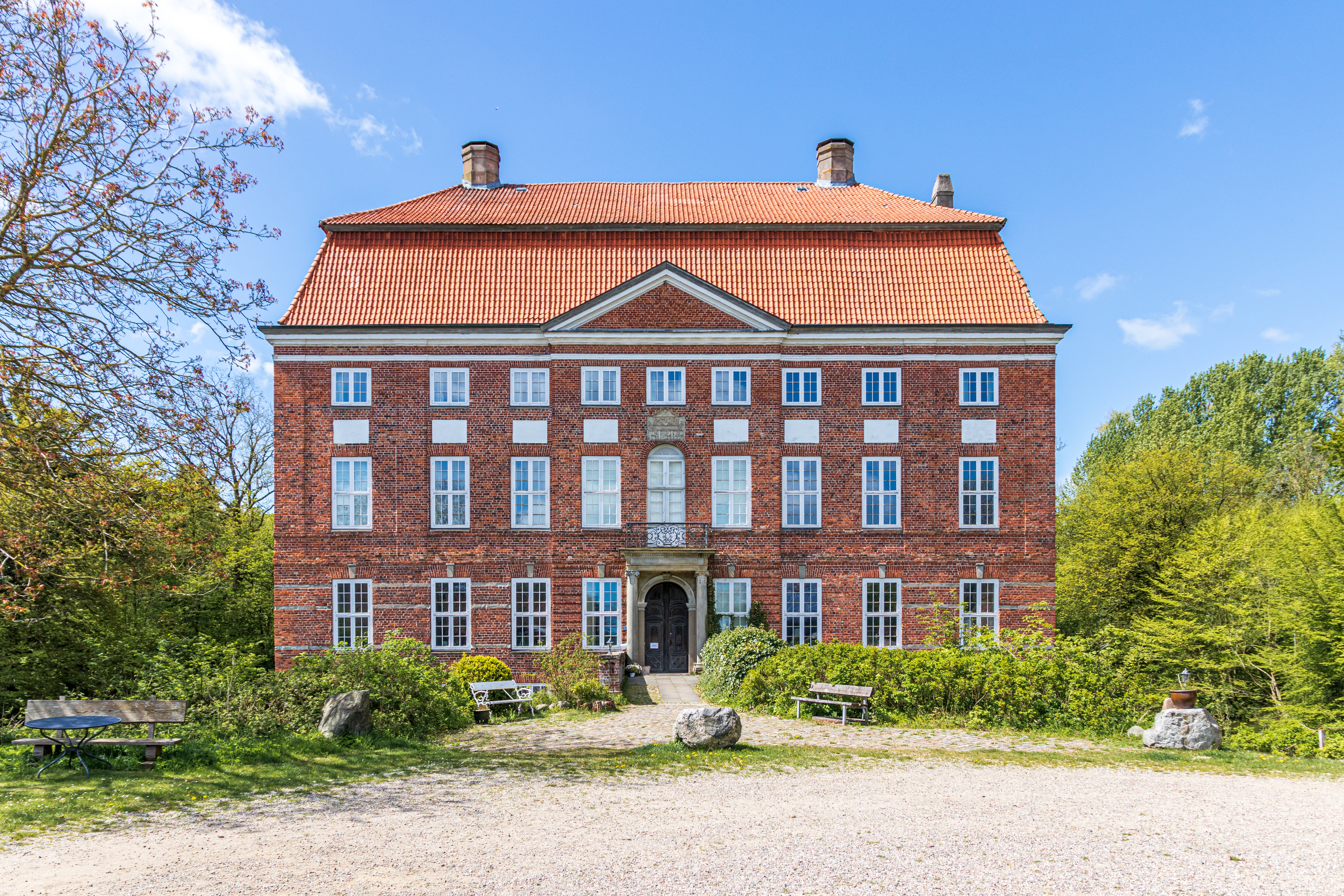 Gut Ludwigsburg – Haupthaus, Hoffassade